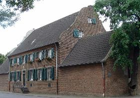 Ordenshof Auenheim by Tobias Sckerl